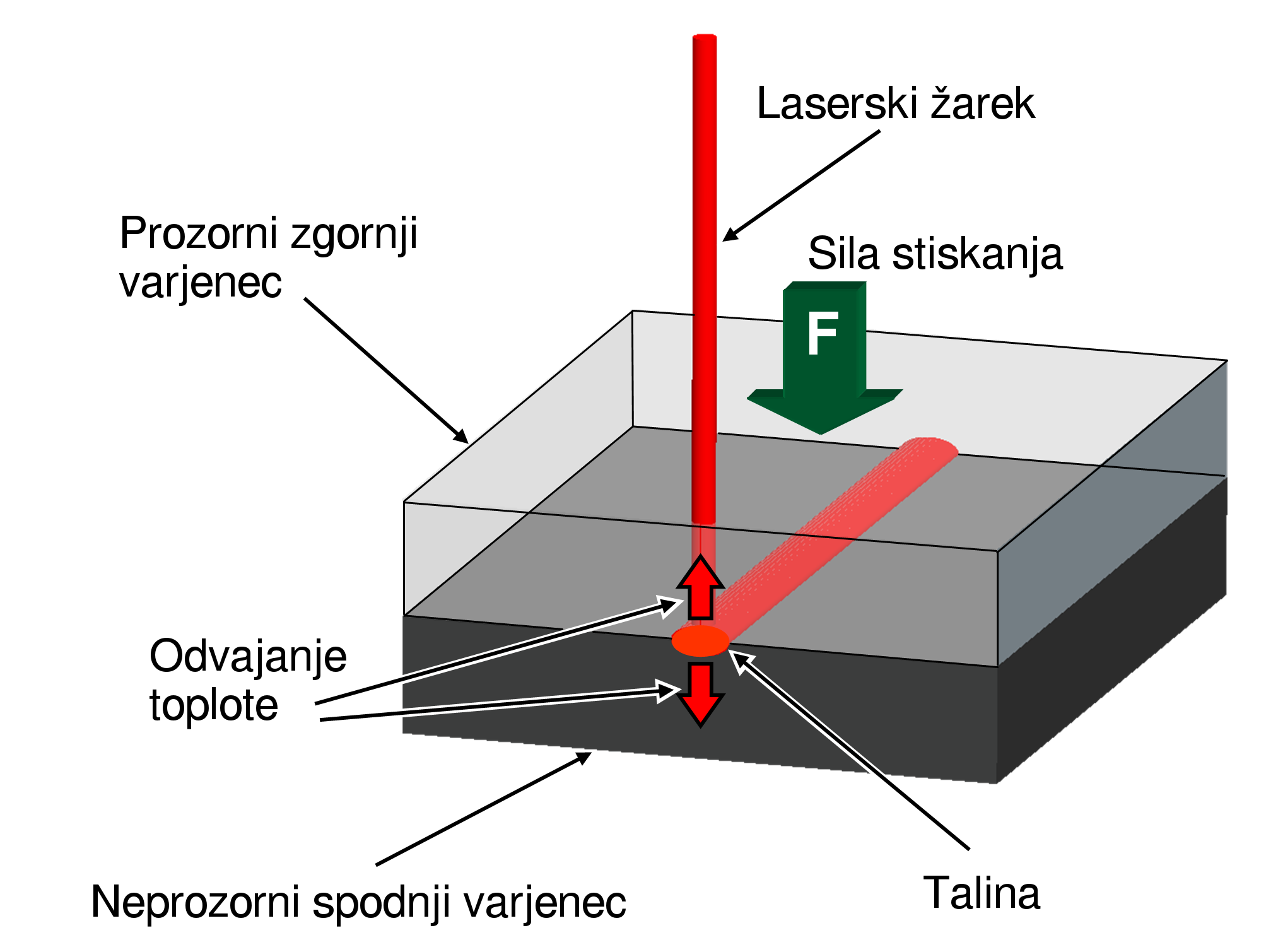 Na tej sliki so izvirne nemške oznake zamenjane s slovenskimi. In this image the original german labels are replaced by slovene ones. Auf diesem Bild wurden die ursprunglichen deutschen Bezeichnungen mit slowenischen ersetzt.